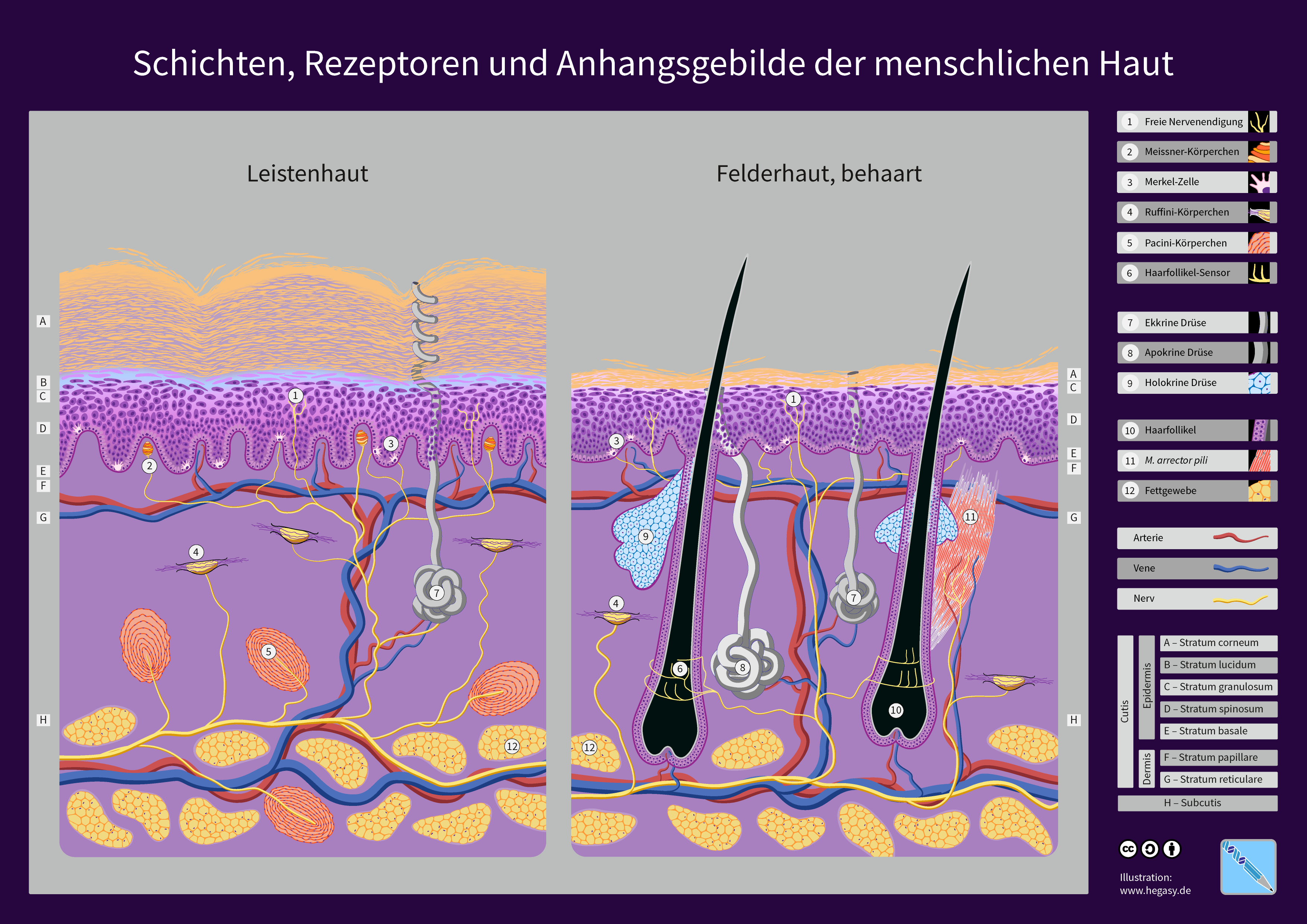 Schichten, Rezeptoren und Anhangsgebilde der menschlichen Haut